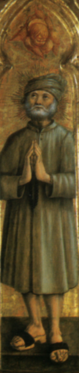 Crivelli, due santi di portland, Beato Ugolino Magalotti da Fiegni